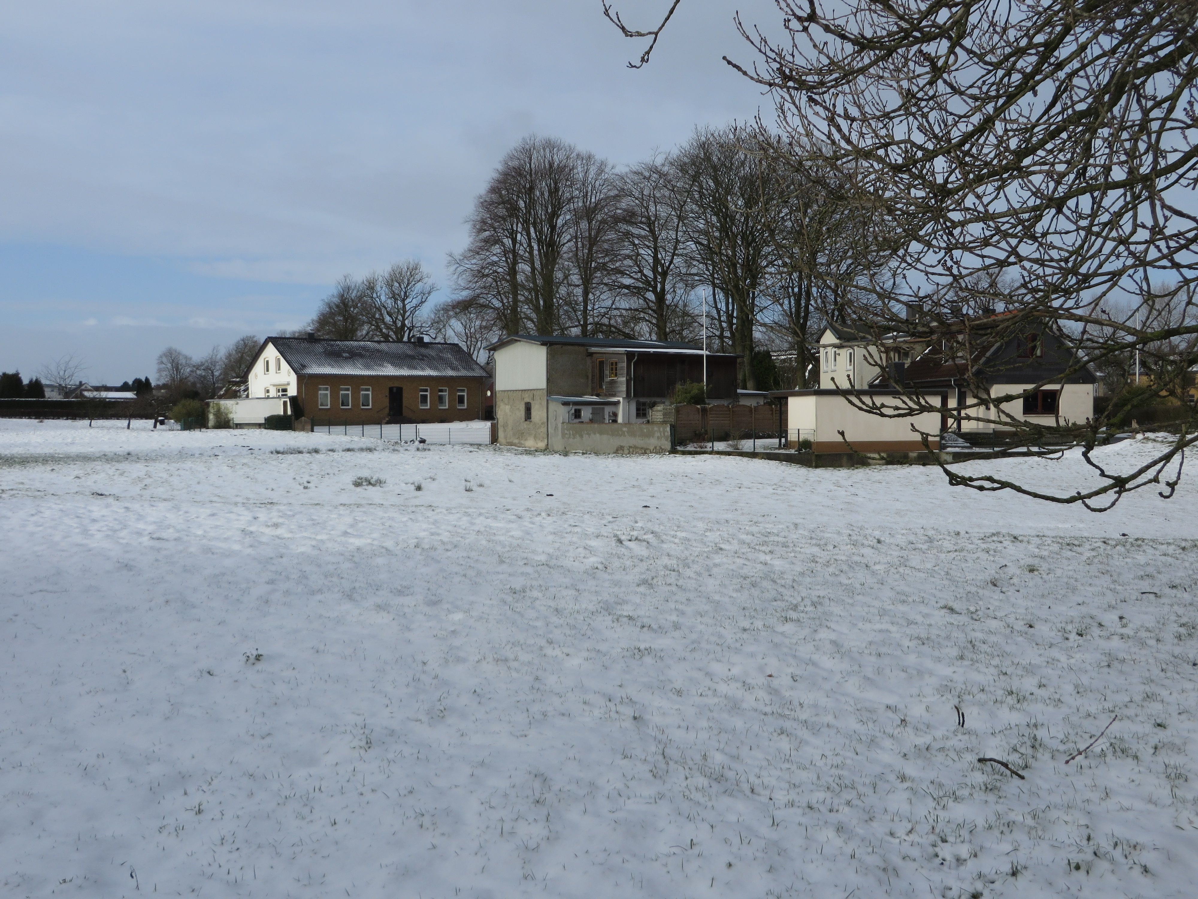 Engelsby-Dorf im Schnee (Flensburg 2015), Bild 05